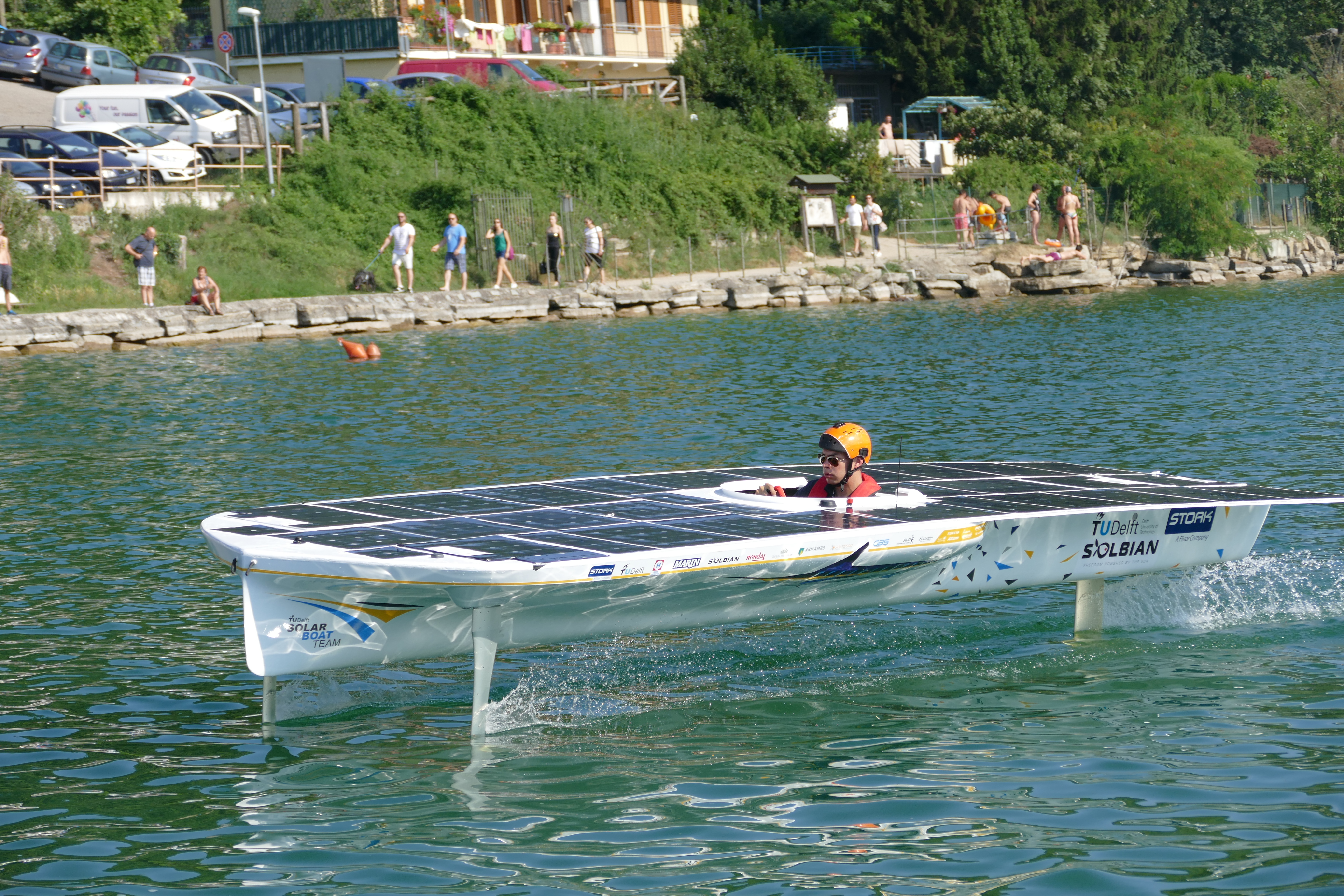 De TU Delft Solar Boat uit 2017 in Turijn tijdens een evenement.